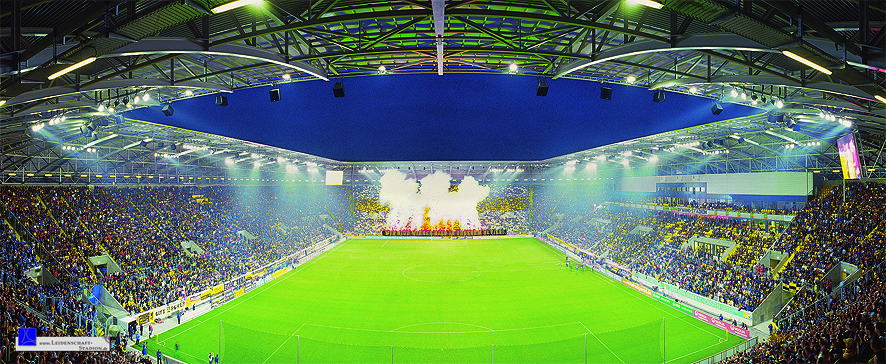 Stadioneröffnung am 15. September 2009